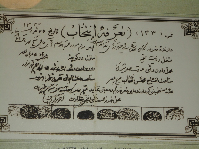 تعرفه انتخابات زمان مشروطیت در اصفهان